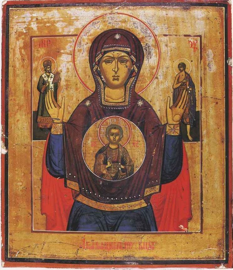 Abalakskaya icon of virgin Mary. Абалакская икона Божией матери